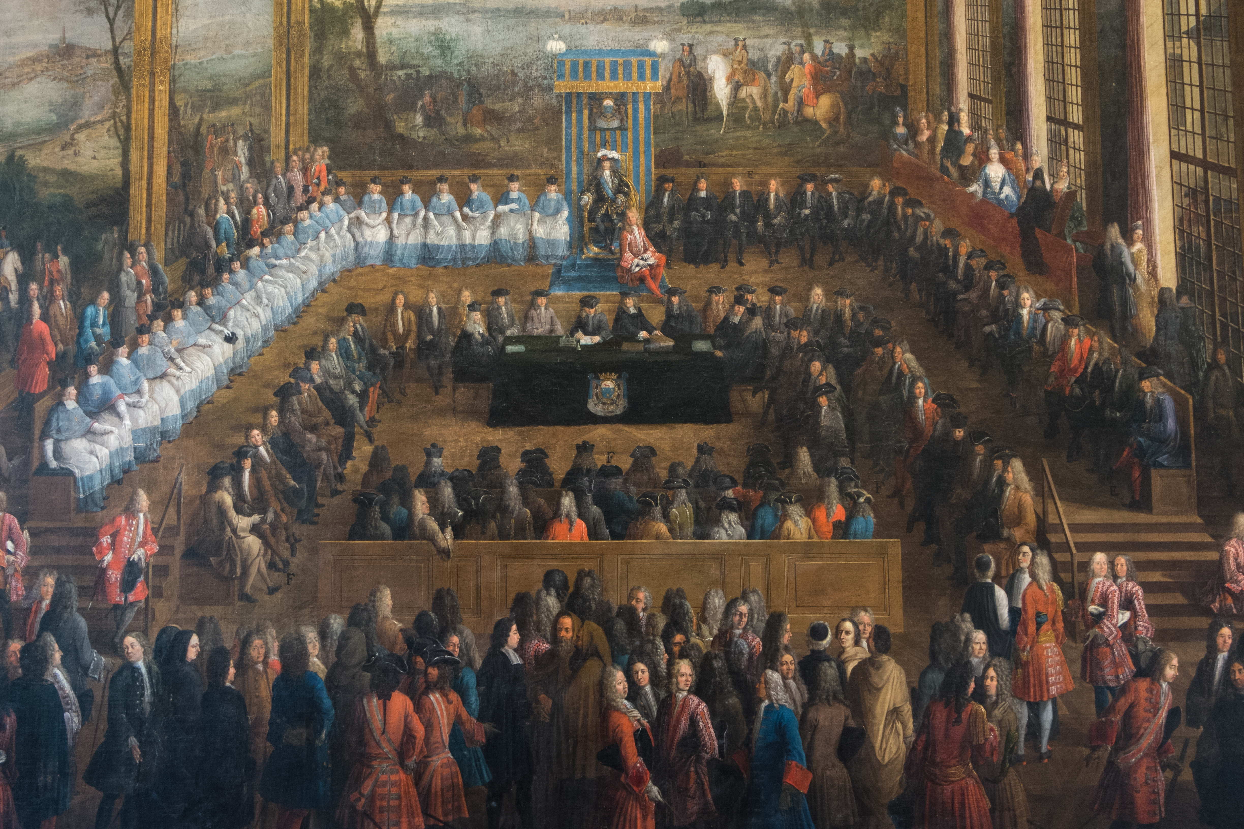 Toile des États généraux du Languedoc: sous la présidence du Maréchal-Duc de Villars, en l'Hôtel de Ville de Montpellier. La noblesse se tient à droite avec ses 23 barons des états, le clergé à gauche avec ses 23 évêques et archevêques et le Tiers-État face à la présidence